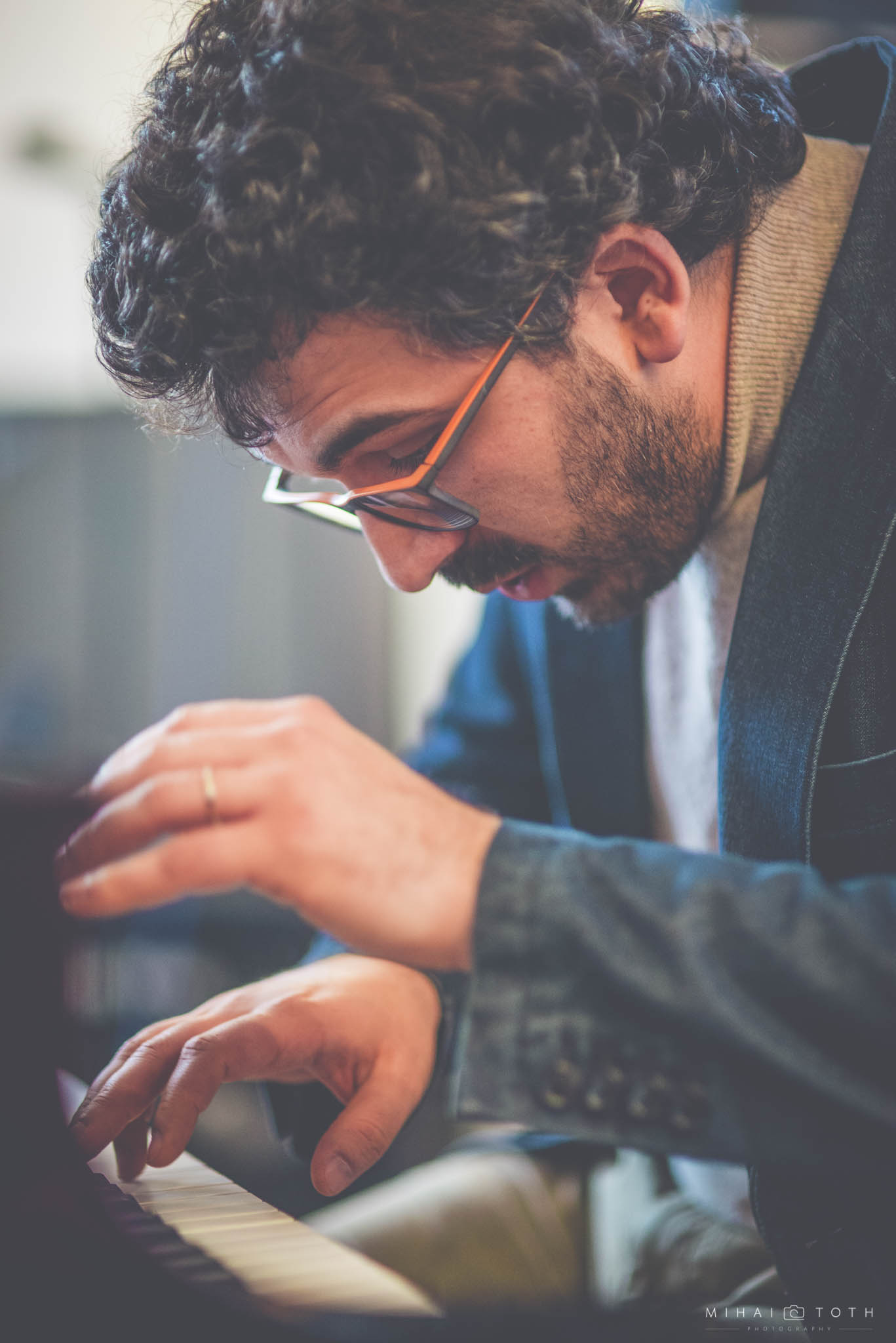 Teo Milea